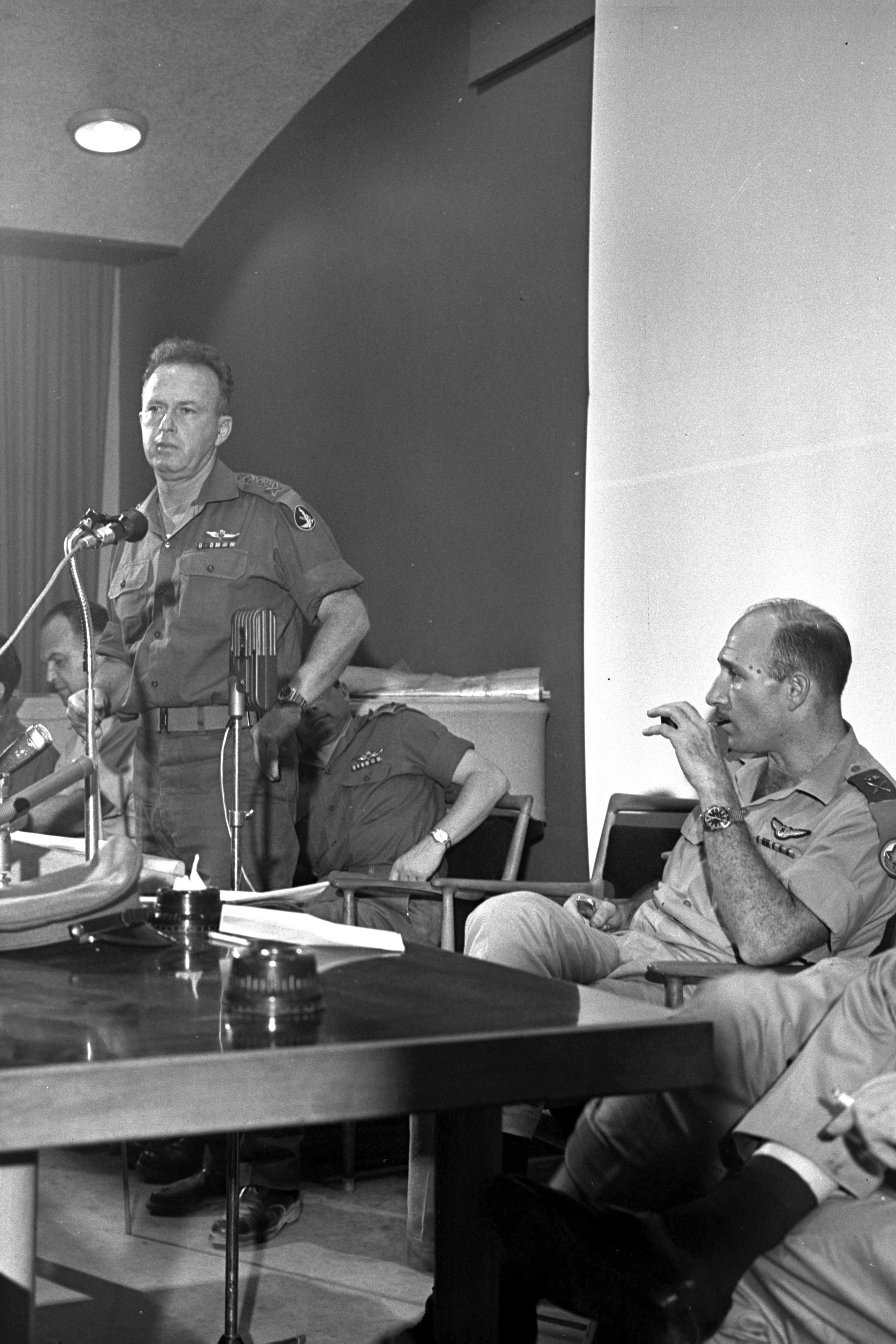 Chief of staff Yitzhak Rabin and Air Force commander Moardechai Hod speaking at press conference in Tel Aviv. הרמטכל, יצחק רבין, ומפקד חיל האוויר מרדכי הוד במסיבת עיתונאים בתל אביב